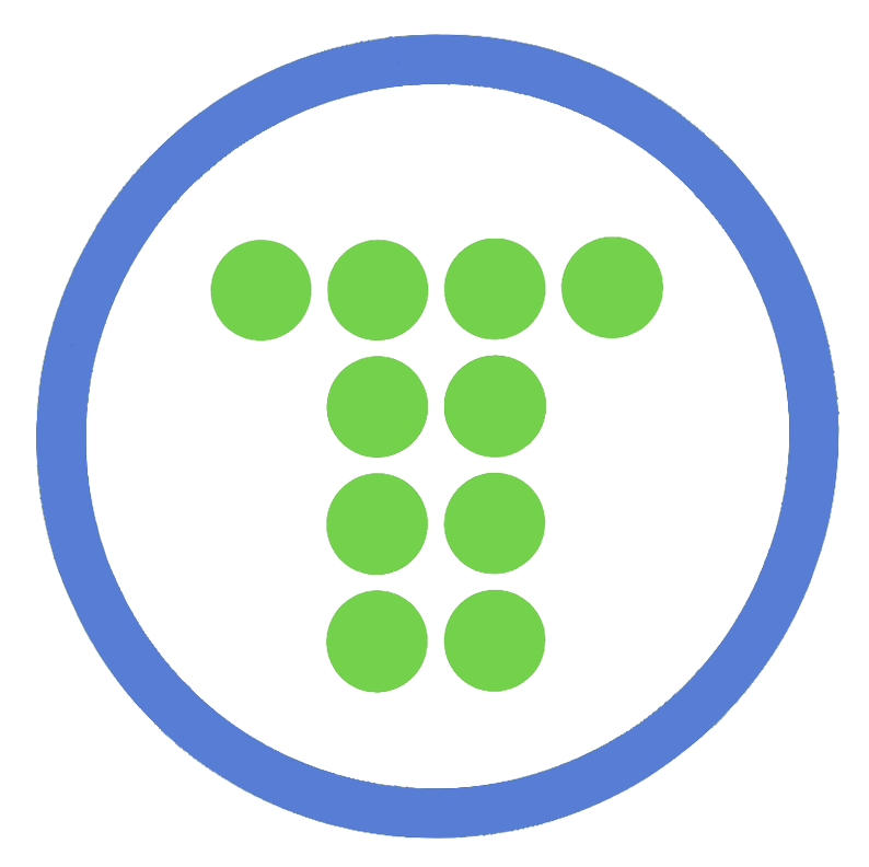 Logotipo de Telefónica usado desde 1984